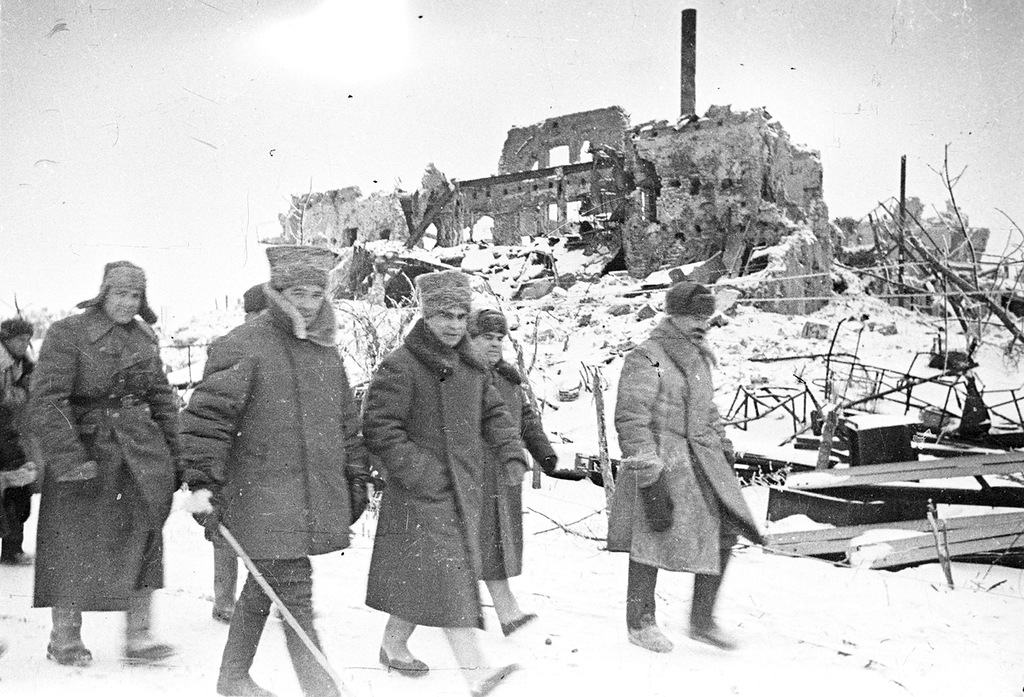 Командующий 62-й армией Сталинградского фронта генерал-лейтенант Василий Иванович Чуйков (с палкой) и член военного совета Сталинградского фронта генерал-лейтенант Кузьма Акимович Гуров (по левую руку Чуйкова) в районе Сталинграда. 1943 г